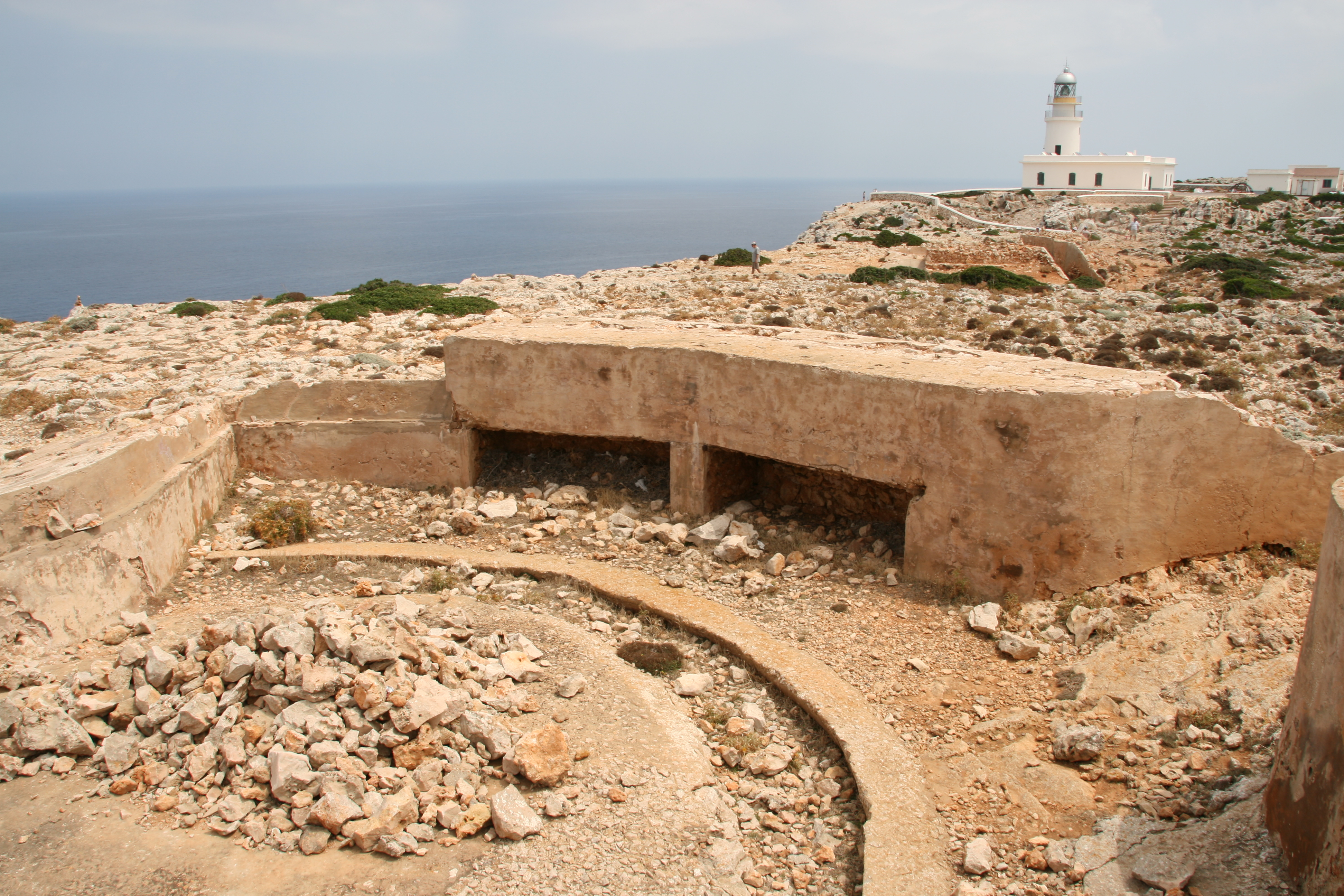 Restos de una posición a barbeta con tres pozos para cañones de 150 mm u obuses de 155/13mm. Se construyo durante la Guerra Civil This is a photography of a Special Area of Conservation in Spain with the ID: ES0000231. Natura2000 entry, EEA entry